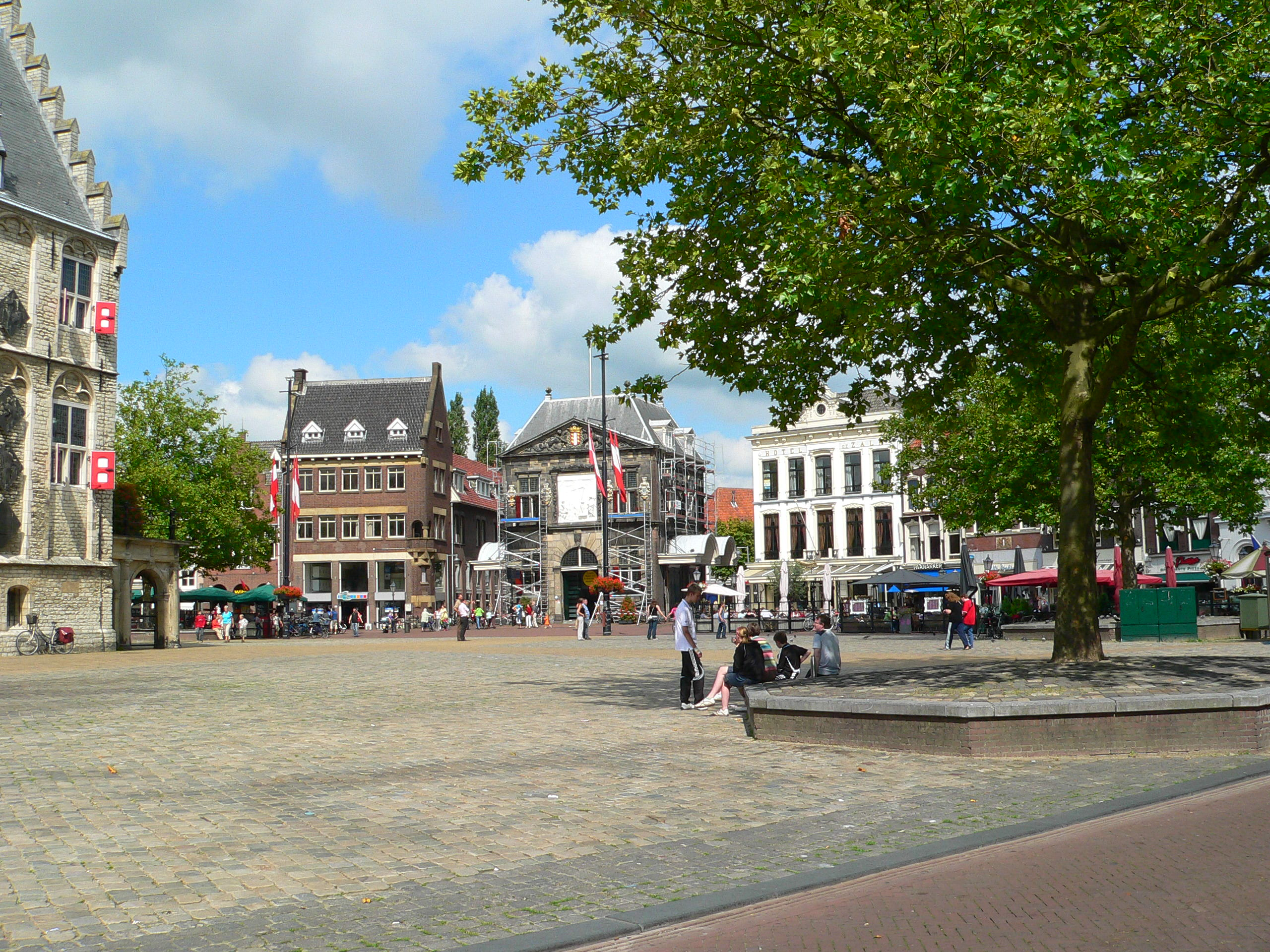 Der Marktplatz in Gouda (Niederlande) östlich des Rathauses in Richtung "de Waag" (Richtung Norden) fotografiert